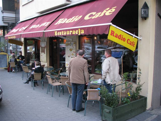 Stowarzyszenie Pracowników, Współpracowników i Przyjaciół Rozgłośni Polskiej Radia Wolna Europa Imienia Jana Nowaka-Jeziorańskiego (siedziba Stowarzyszenia: Radio Café, ul. Nowogrodzka 56, 00-695 Warszawa)